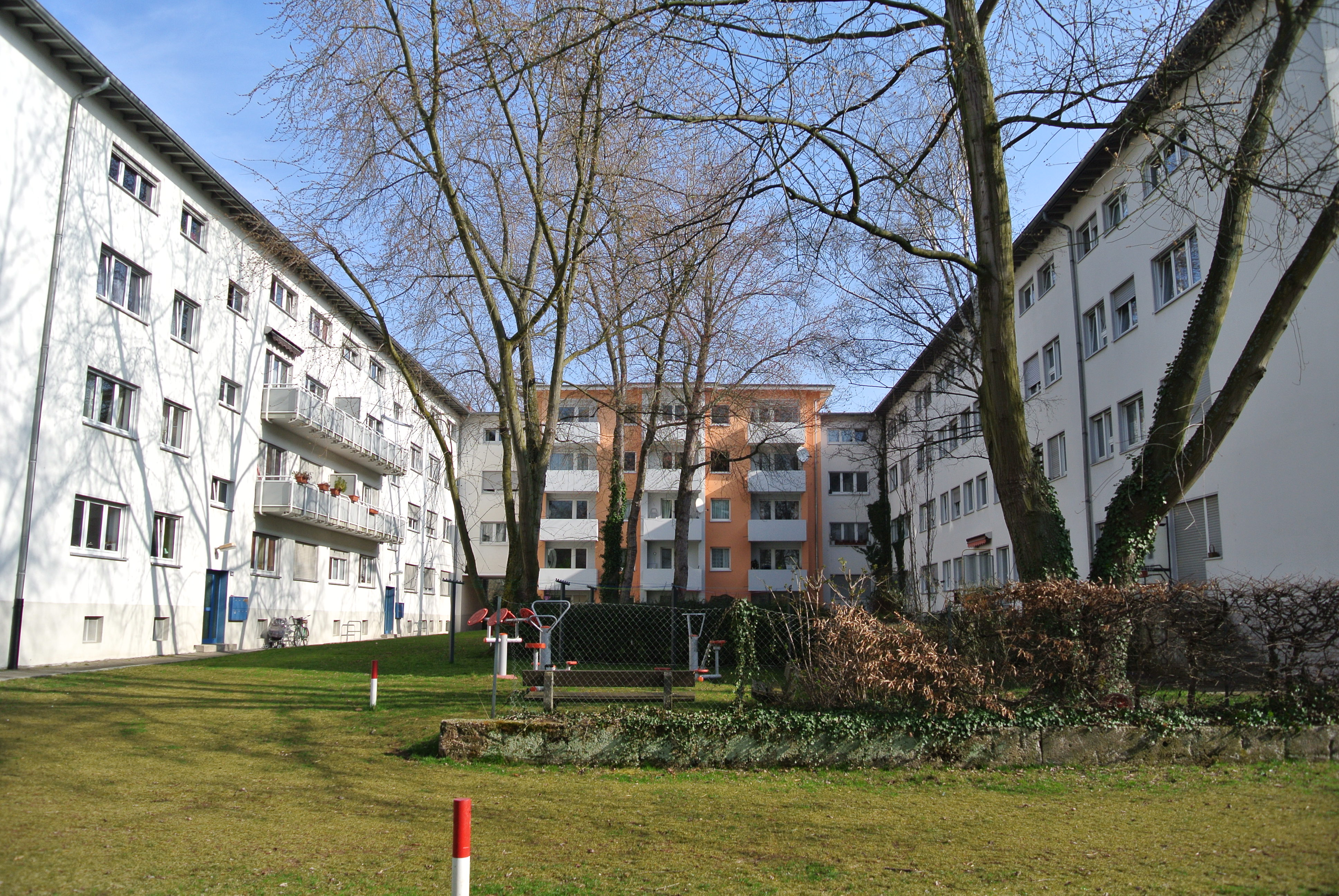 Siedlung Raimundstraße in Frankfurt-Dornbusch, 1930, Raimundstraße